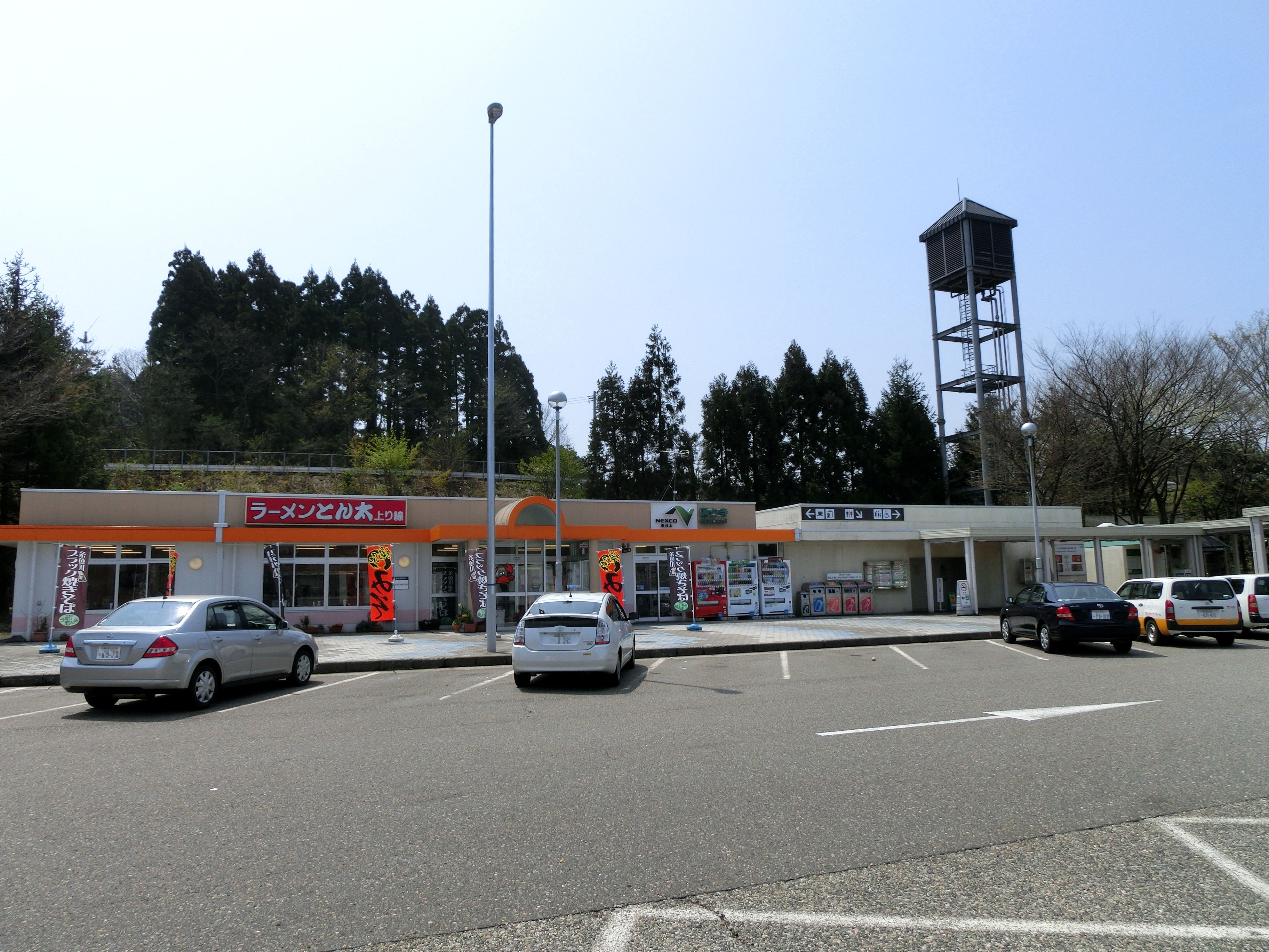 北陸自動車道 蓮台寺パーキングエリア（上り線）